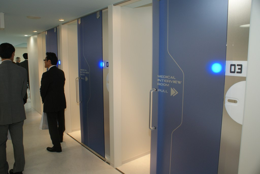 akiba:F Opening Event - 014